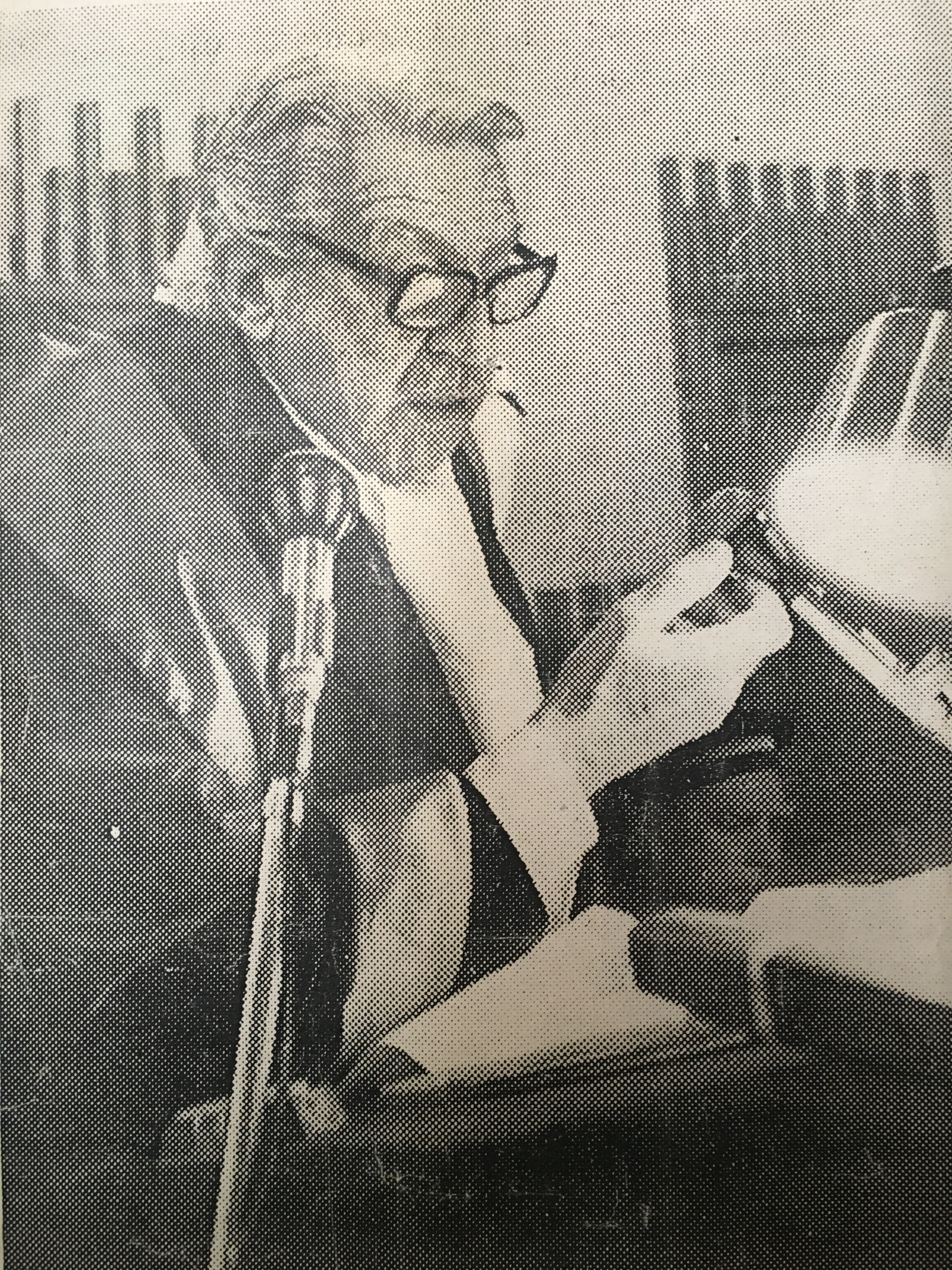 Il P.G. Vessichelli legge la Relazione all'inaugurazuine dell'anno giudiziario 1988 presso la Corte d'Appello de l'Aquila